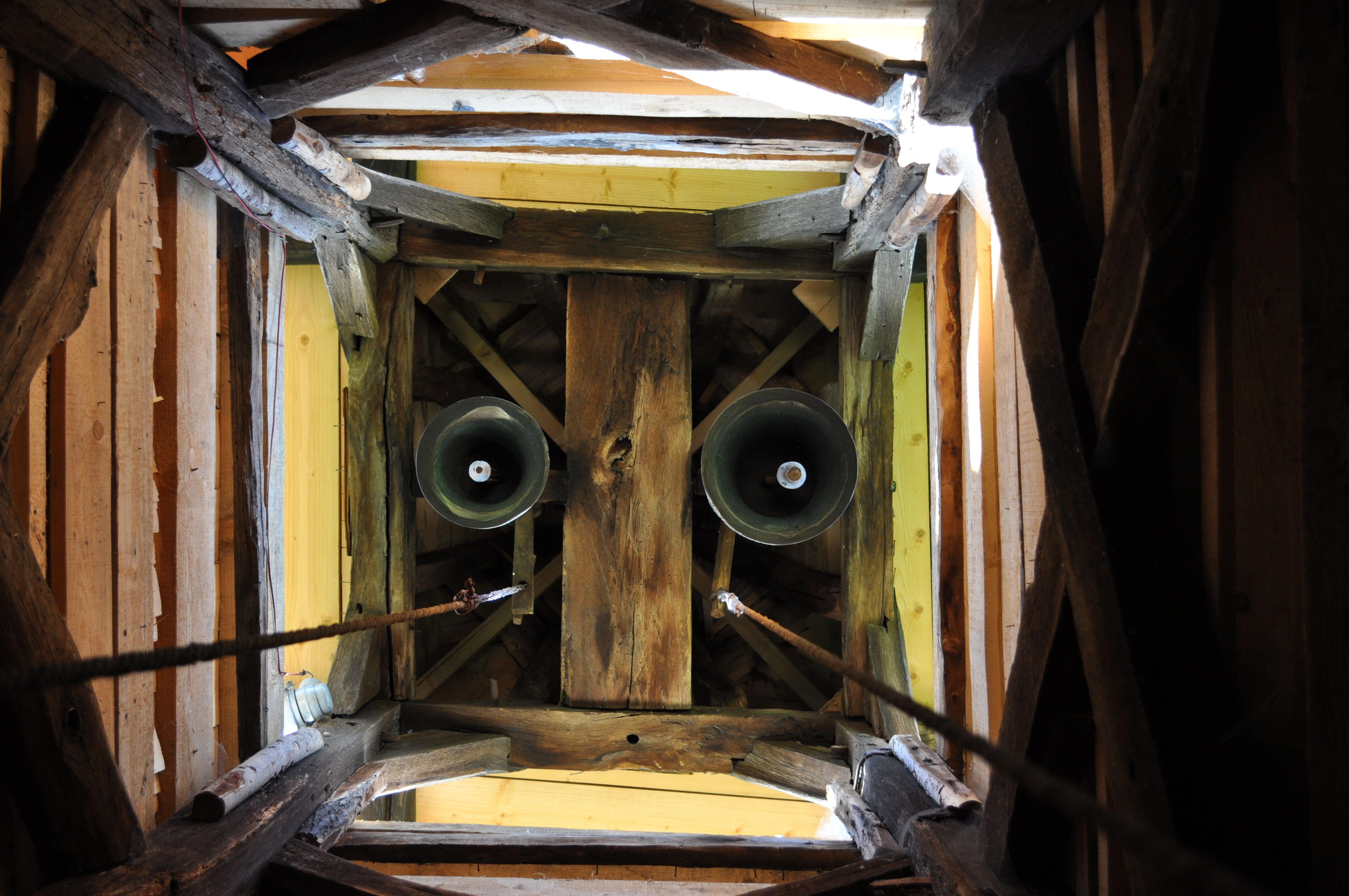 Biserica de lemn din Ticu-sat, județul Cluj